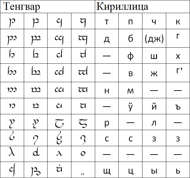 Сравнение тенгвара с русской письменностью.